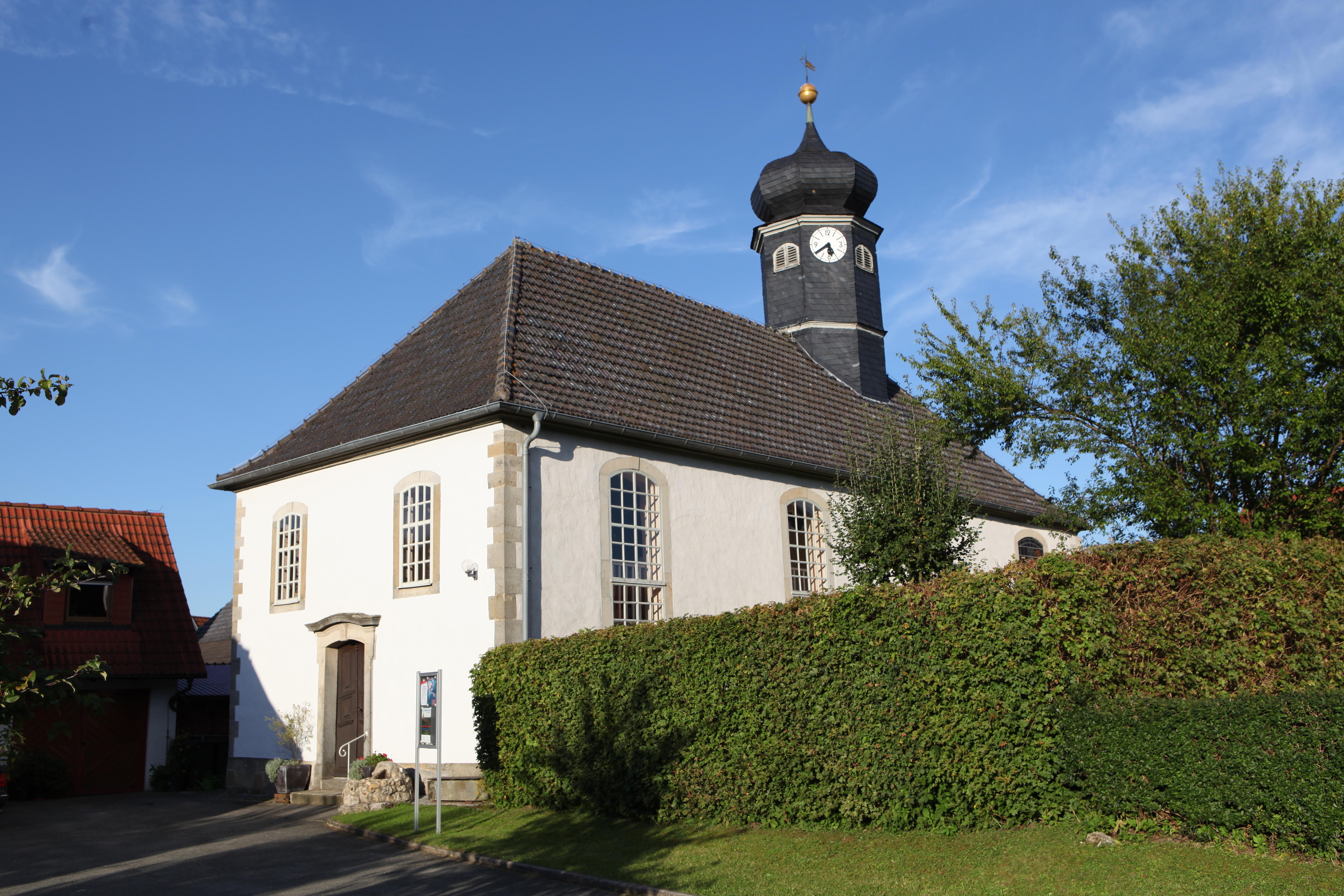 Evangelische Filialkirche St. Paulus in Grattstadt, Landkreis Coburg